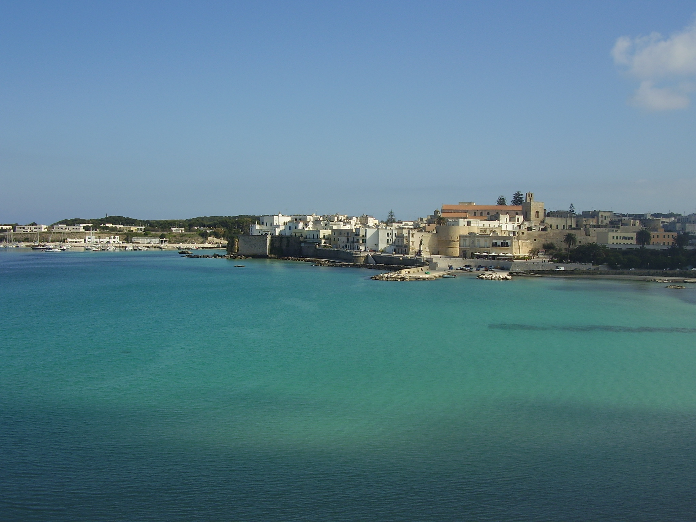 Panorama Baia di Otranto.jpg